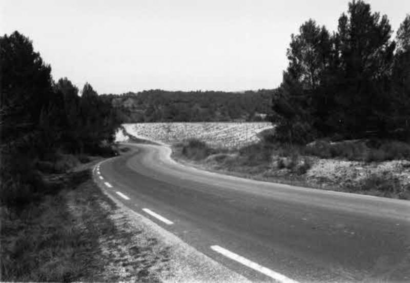 Vista i localització del jaciment